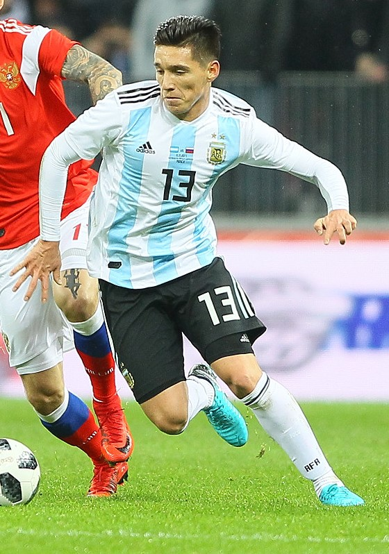 Claudio Matías Kranevitter